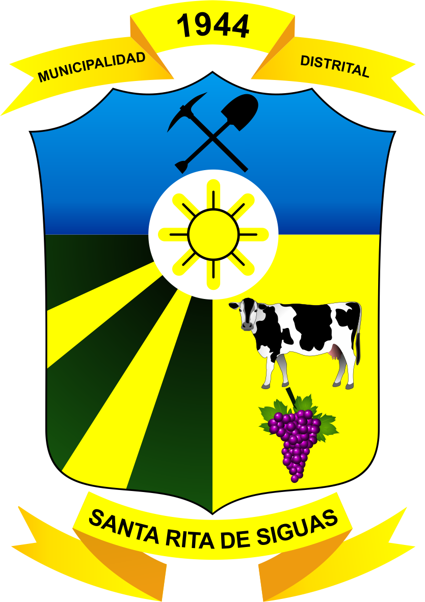 Distrito de Santa Rita de Siguas